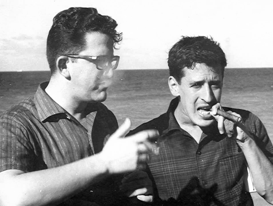 El periodista salvadoreño Roque Dalton junto al poeta cubano Heberto Padilla (a la izquierda) en La Habana.